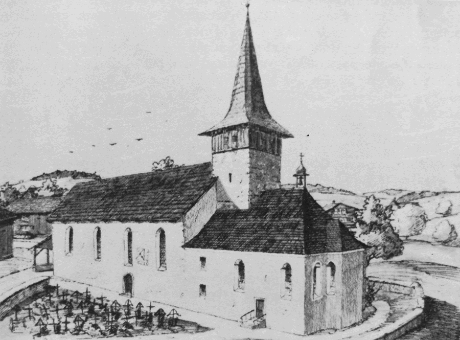 zweite Kirchberger Kirche (1404 bis 1748) mit der 1695 erbauten Kapelle